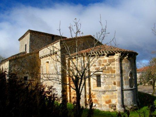 Foto Iglesia Fuente Urbel